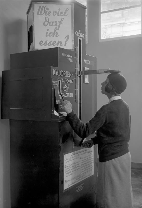 Wieviel darf ich essen ? ! Ein Kalorien-Apparat im Deutschen Museum in München. In der Abteilung Nahrungsmittel-Chemie des Deutschen Museums, wurde dieser originelle Apparat aufgestellt.